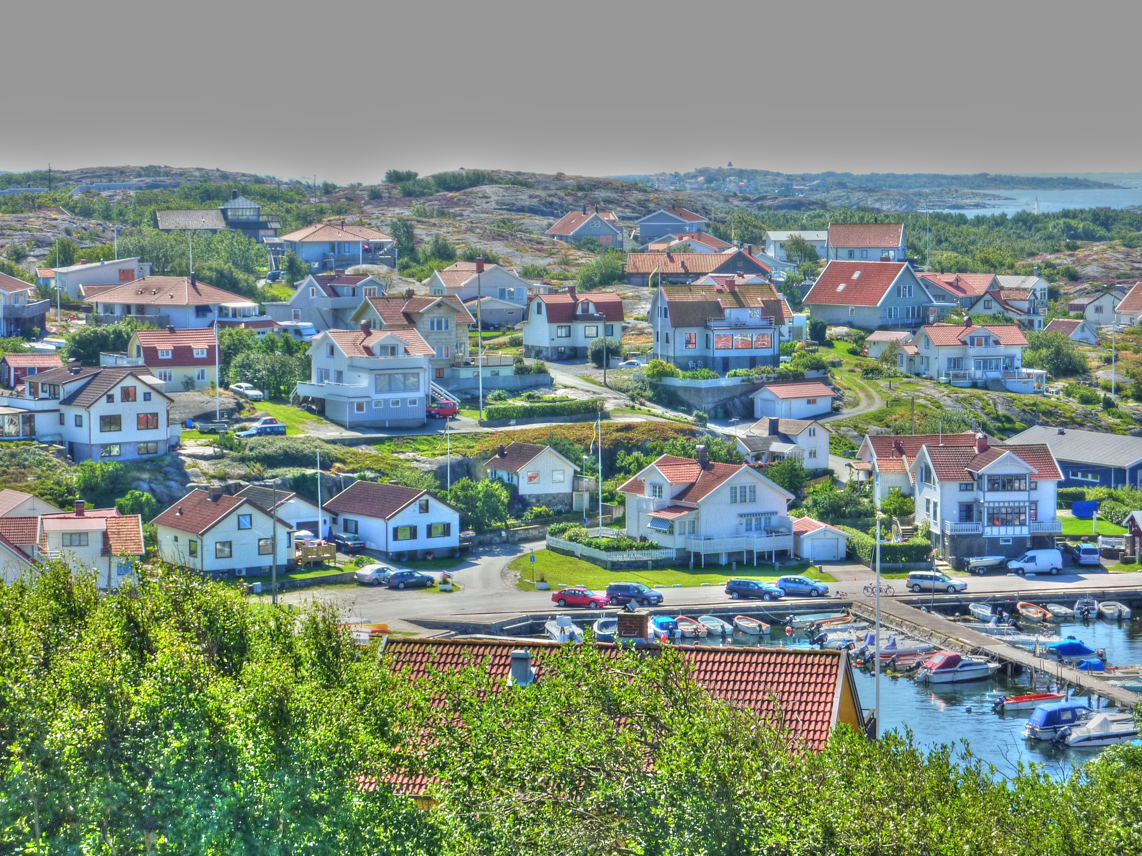 Björkö hamn i HDR